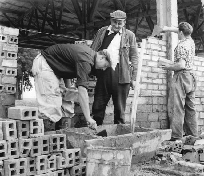 LPG Möllenbeck-Stolpe, Begutachtung einer Baustelle Zentralbild Seliger-Ka-Qu-14.7.1960 Offenstallbauten im Kreis Neustrelitz-Der Vorsitzende der LPG "Goldene Zukunft" Typ III in Möllenbeck-Stolpe, Günter Trapp (Mitte) ist oft auf der Baustelle der LPG anzutreffen. Damit die im bau befindlichen Rinderoffenställe mit 160 Liegeplätzen termingemäß bis zum 15.9.1960 fertiggestellt werden.